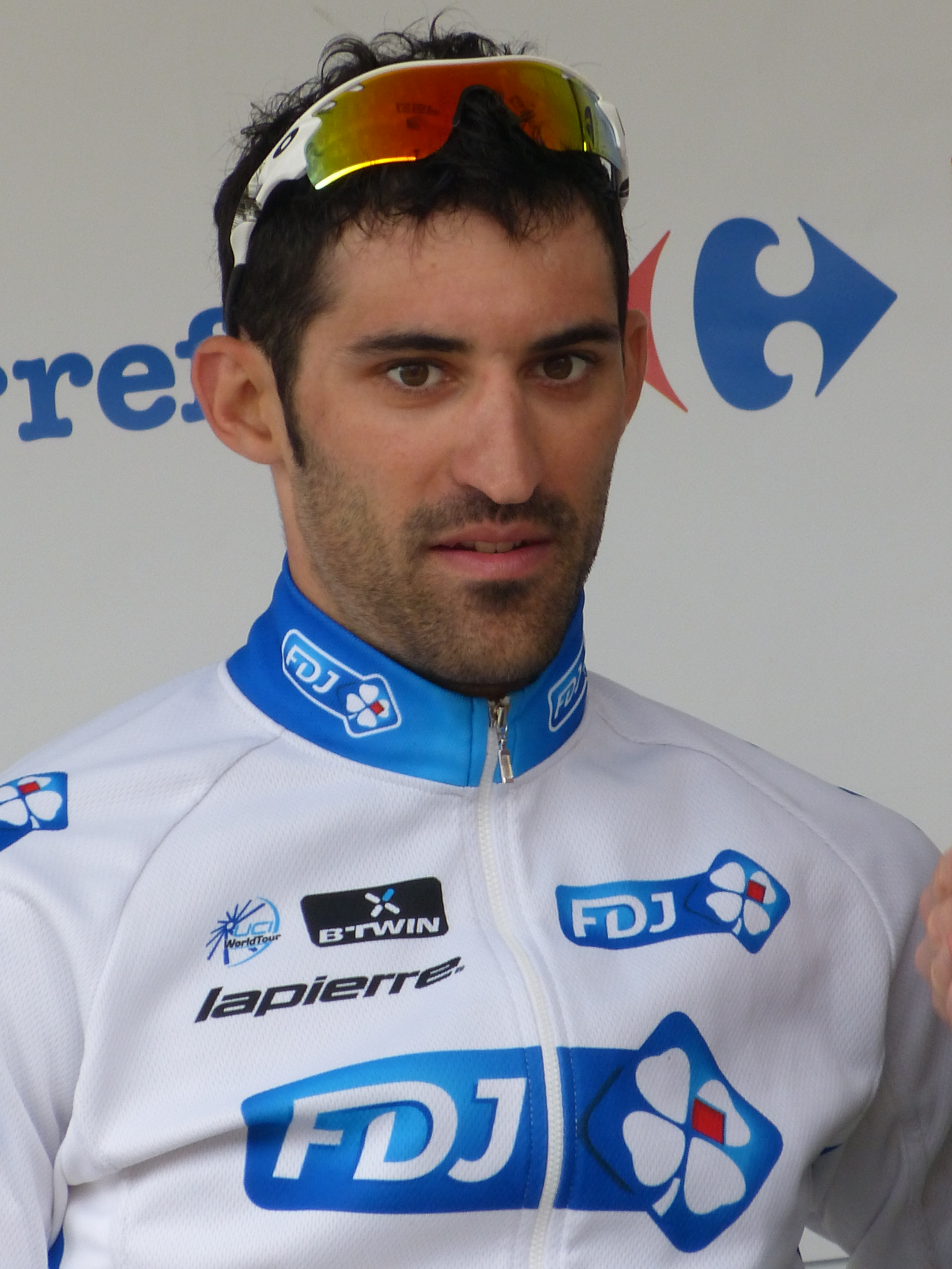 Quatre jours de Dunkerque 2013